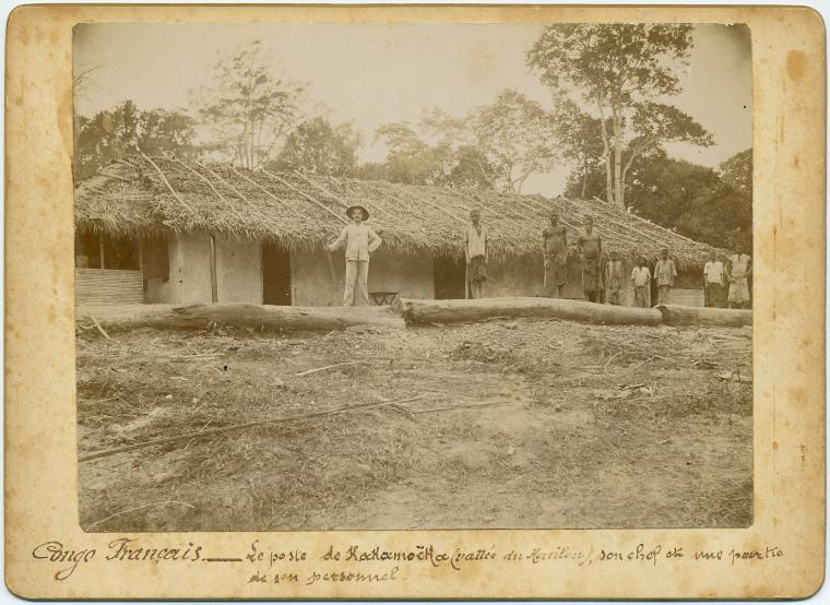 Le poste de Kakamoeka (vallée du Kouilou), son chef et une partie de son personnel - Congo Français